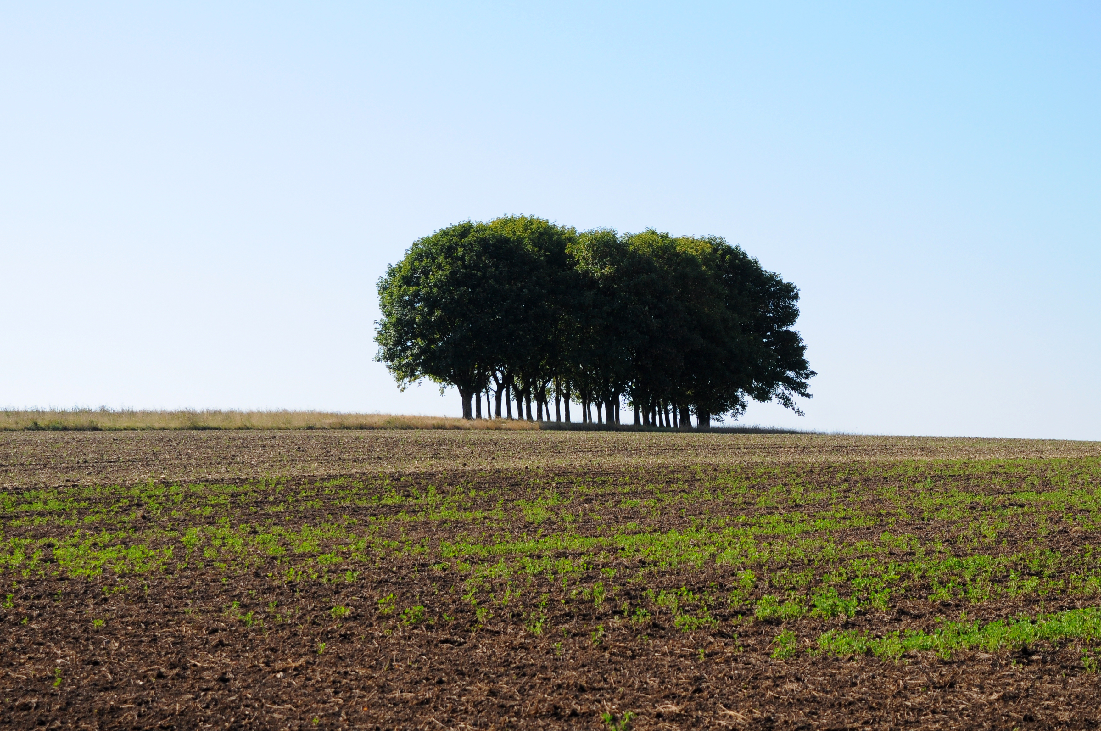 Baumgruppe des Cholerafriedhofs in Paasdorf